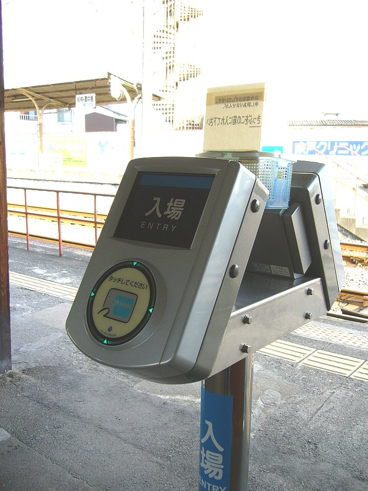 ICい～カード 簡易リーダー 余戸駅にて